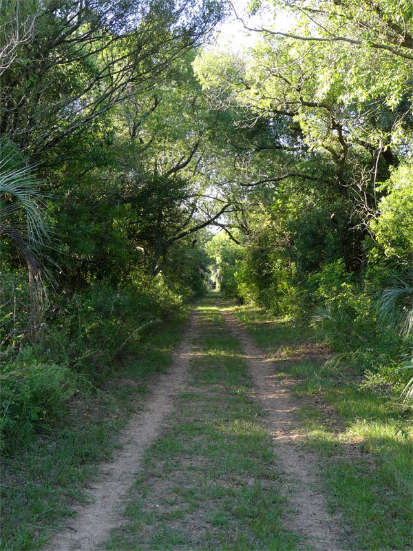 Sendero Yatay dentro del Parque Nacional Mburucuyá